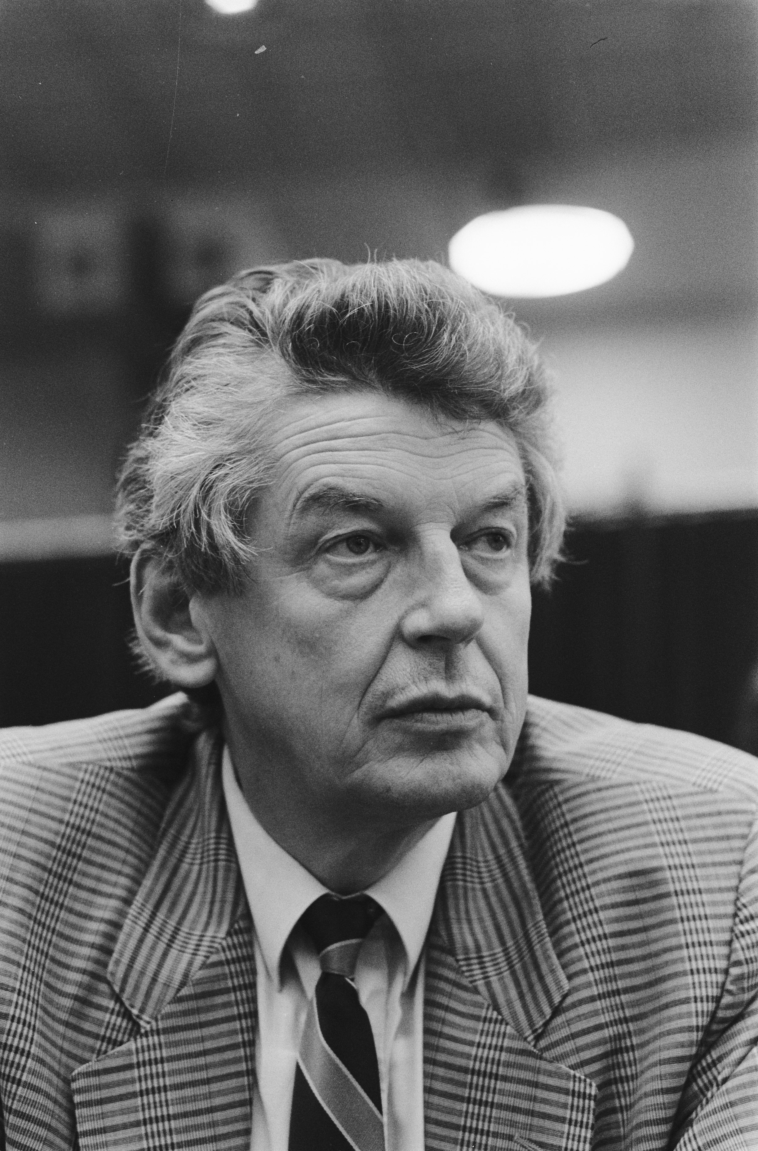 Collectie / Archief : Fotocollectie Anefo Reportage / Serie : [ onbekend ] Beschrijving : Wim Kok van de PvdA in de Tweede Kamer Datum : 23 mei 1989 Locatie : Den Haag, Zuid-Holland Trefwoorden : politiek, portretten Persoonsnaam : Kok, Wim Fotograaf : Croes, Rob C. / Anefo Auteursrechthebbende : Nationaal Archief Materiaalsoort : Negatief (zwart/wit) Nummer archiefinventaris : bekijk toegang 2.24.01.05 Bestanddeelnummer : 934-4587